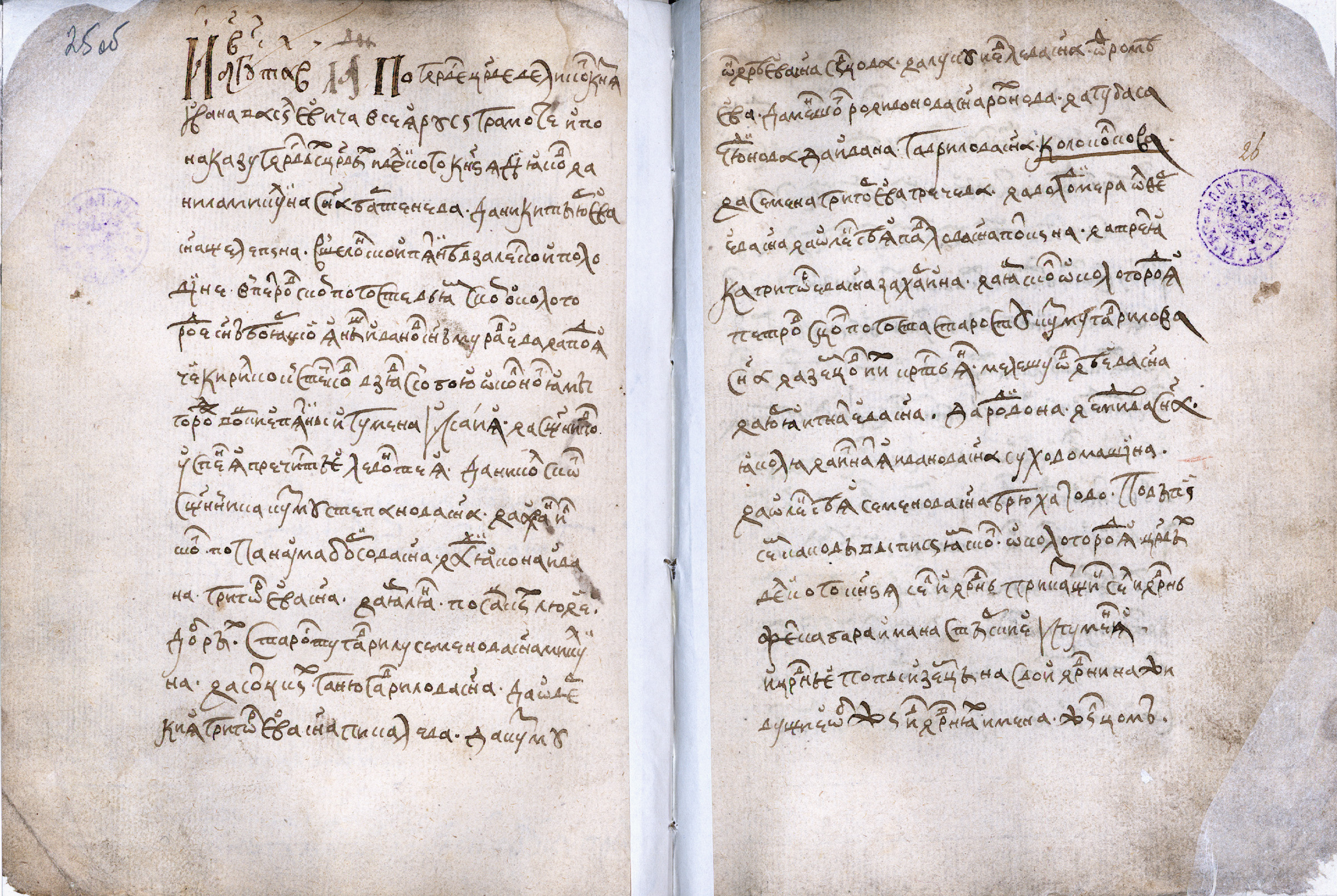 Листы 25об. и 26 из писцовой книги Шелонской пятины 1571 года письма Яныша Иванова сына Муравьева и подьячего Кирилко Кстечкова.